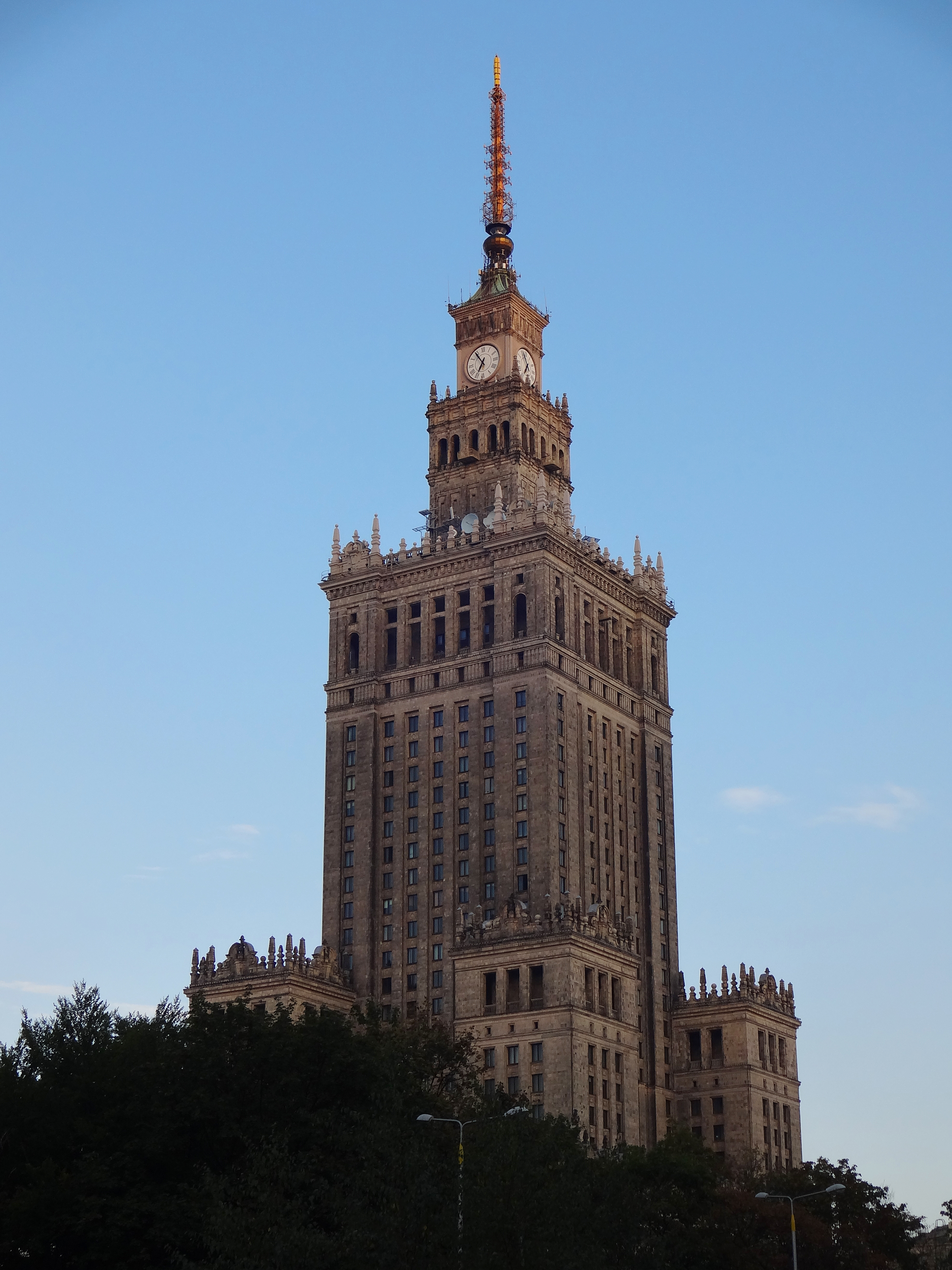 Pałac Kultury i Nauki, pl. Defilad 1, Warszawa 1950-1955